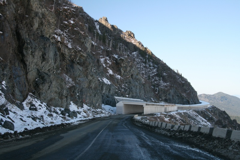 Противолавинная галерея "Полка" на Буйбинском перевале